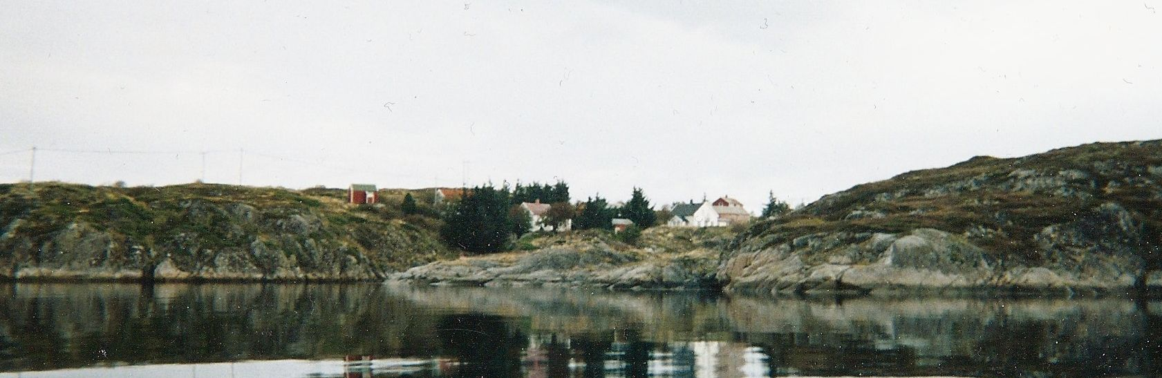 Fiskeværet Skårøya på øya med samme navn utenfor Hitra i Sør-Trøndelag.